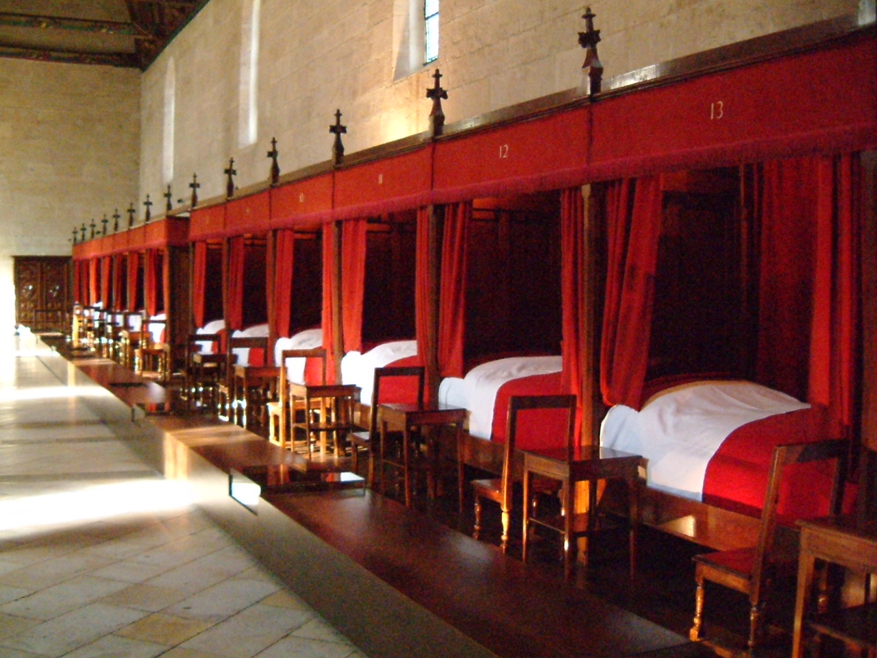 Hospices de Beaune, Bourgogne, FRANCE.